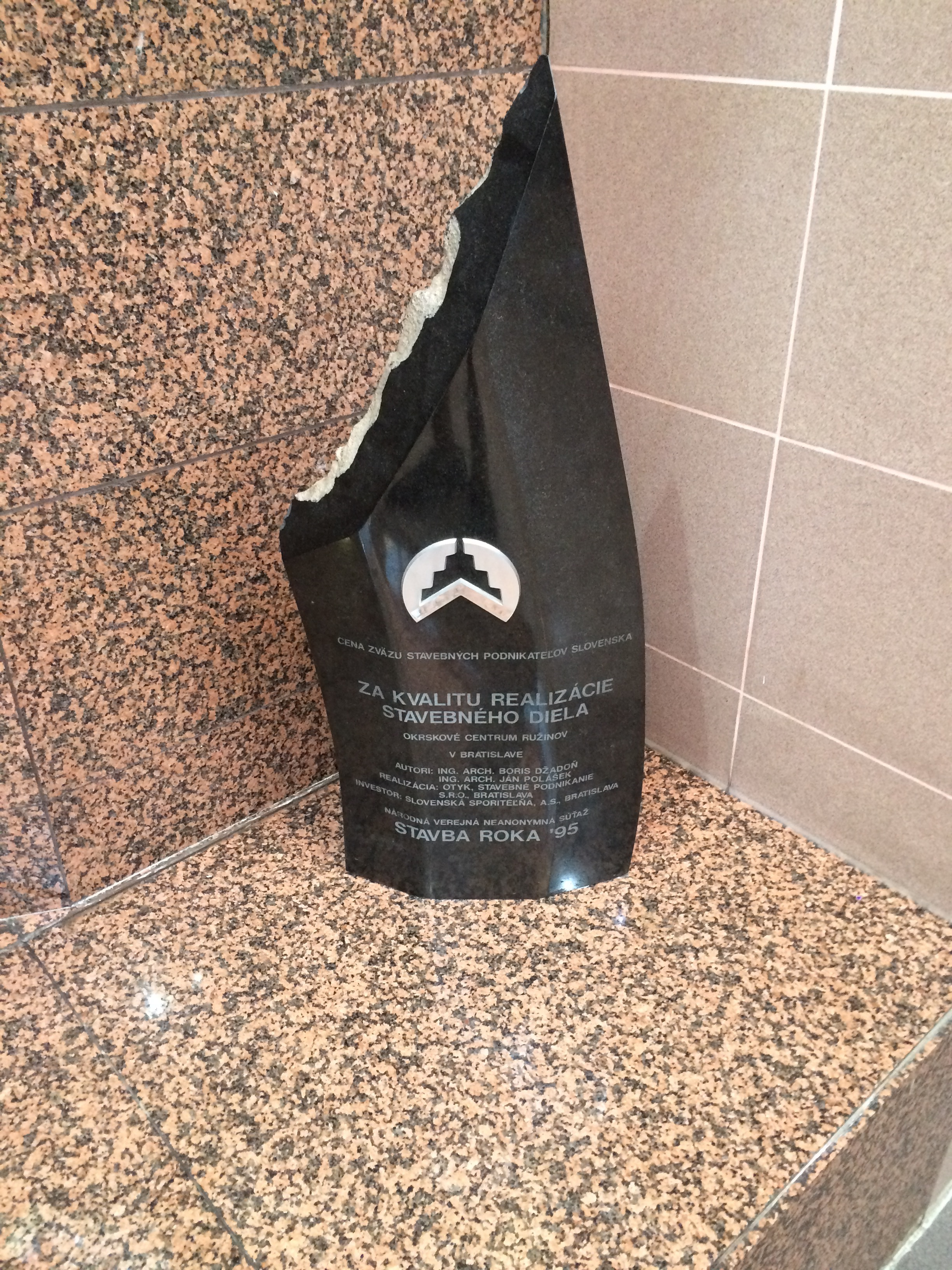 CENA ZVÄZU STAVEBNÝCH PODNIKATEĽOV SLOVENSKA v Okrskovom centre Ružinov v Bratislave.